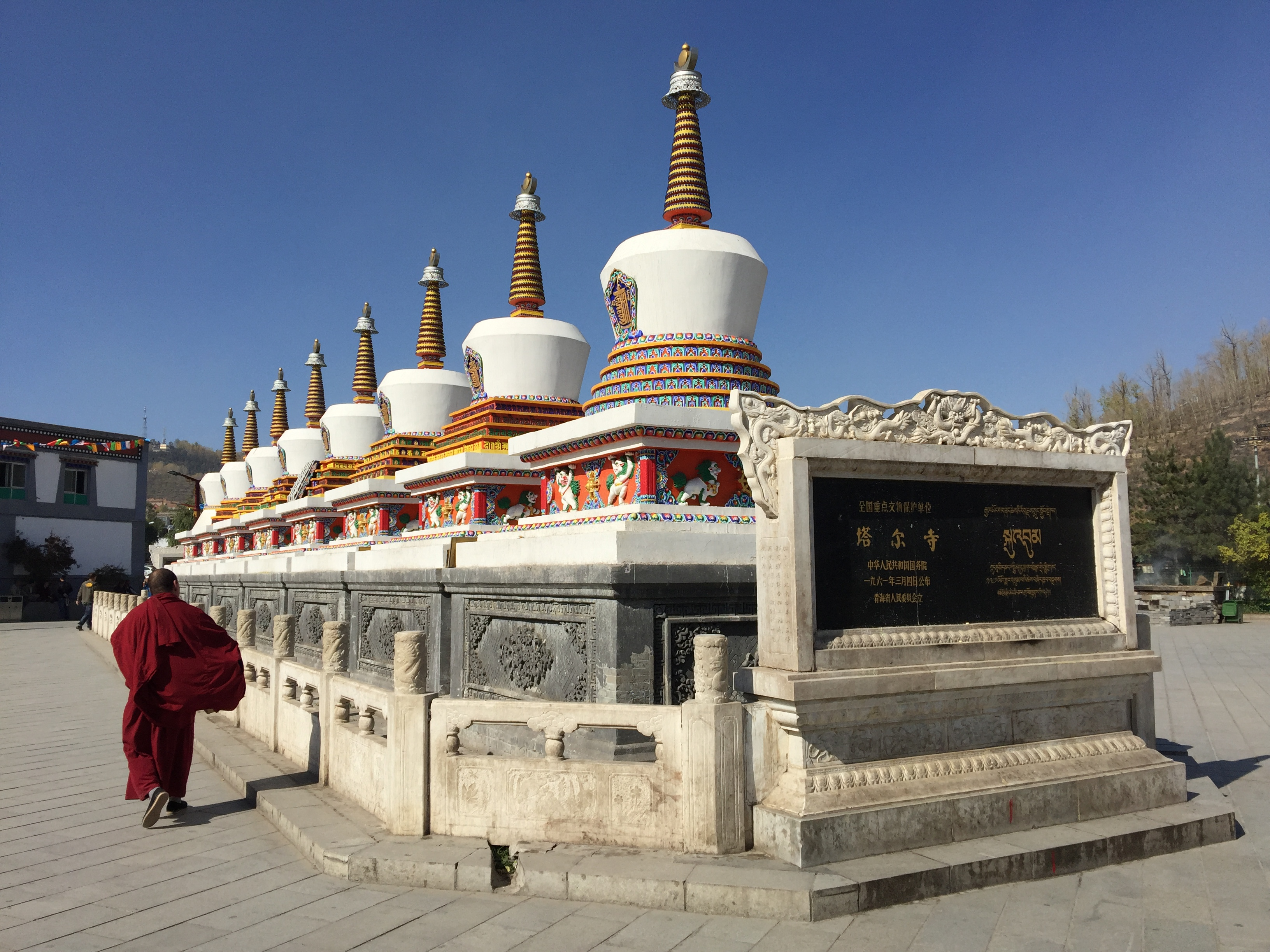 塔尔寺八塔